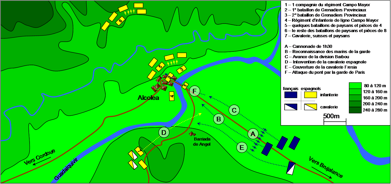 plan du combat d'AlcoleaUnknown